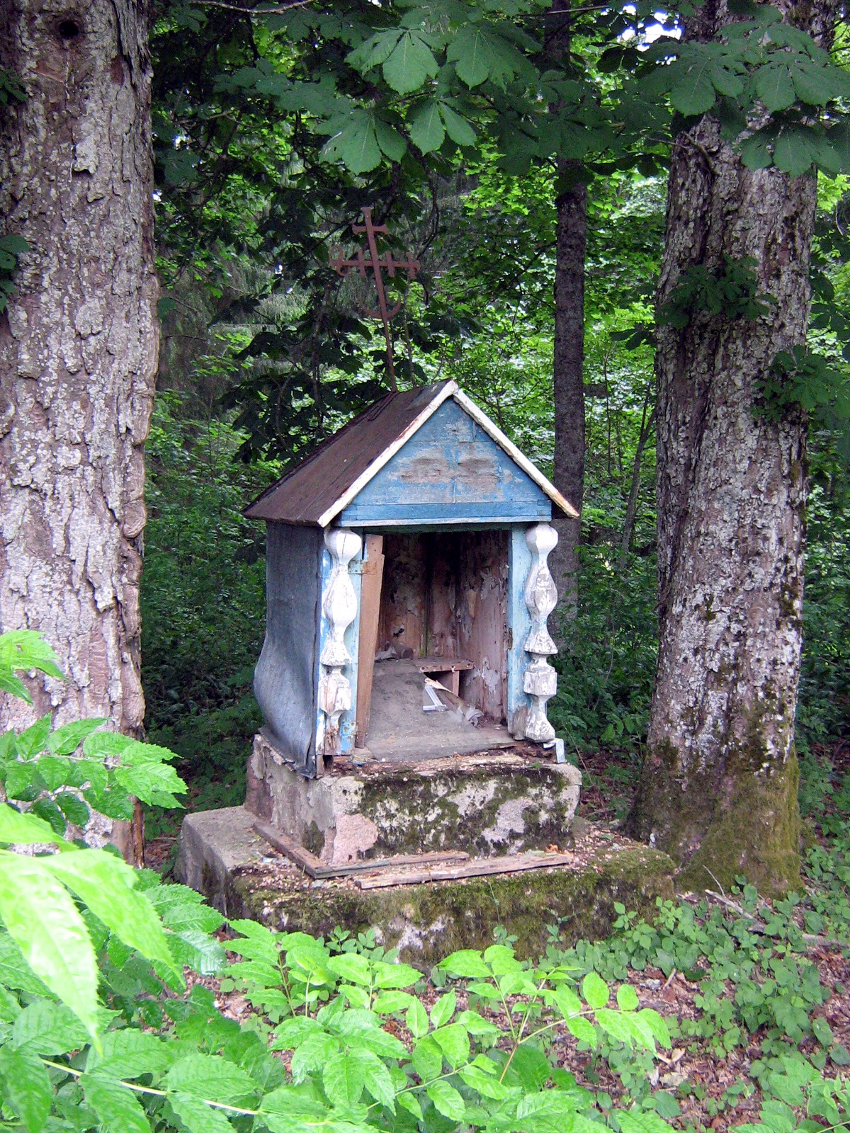 Mačiūkių kaimo koplytėlė, Plungės rajonas, Žemaitijos nacionalinio parko teritorija Foto: Algirdas, 2007 m. birželio 15 d., Lietuva